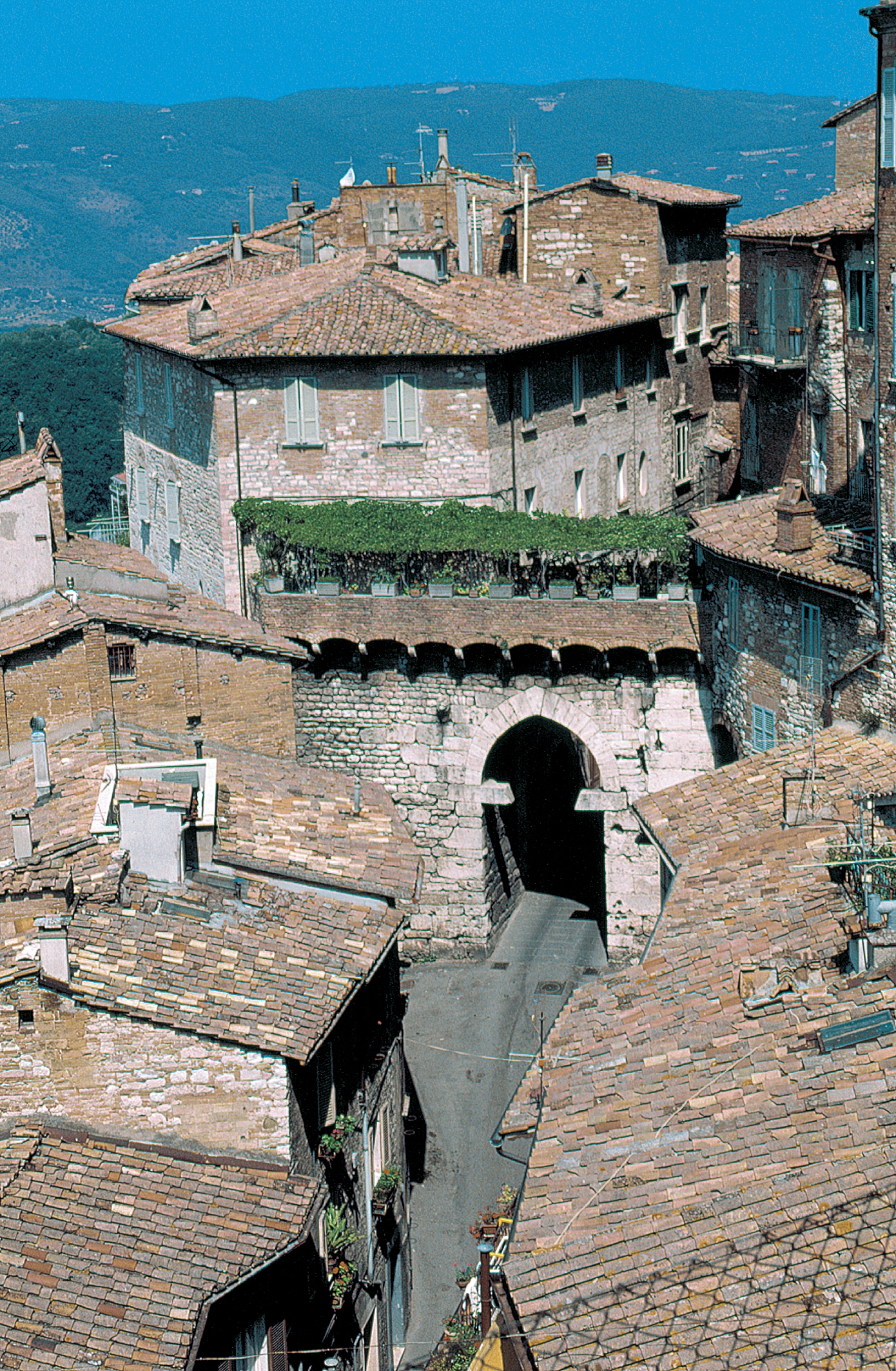 Porta Eburnea o Arco della Mandorla This is a photo of a monument which is part of cultural heritage of Italy.